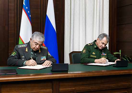 Министр обороны России генерал армии Сергей Шойгу и Министр обороны Узбекистана генерал-полковник Кабул Бердиев